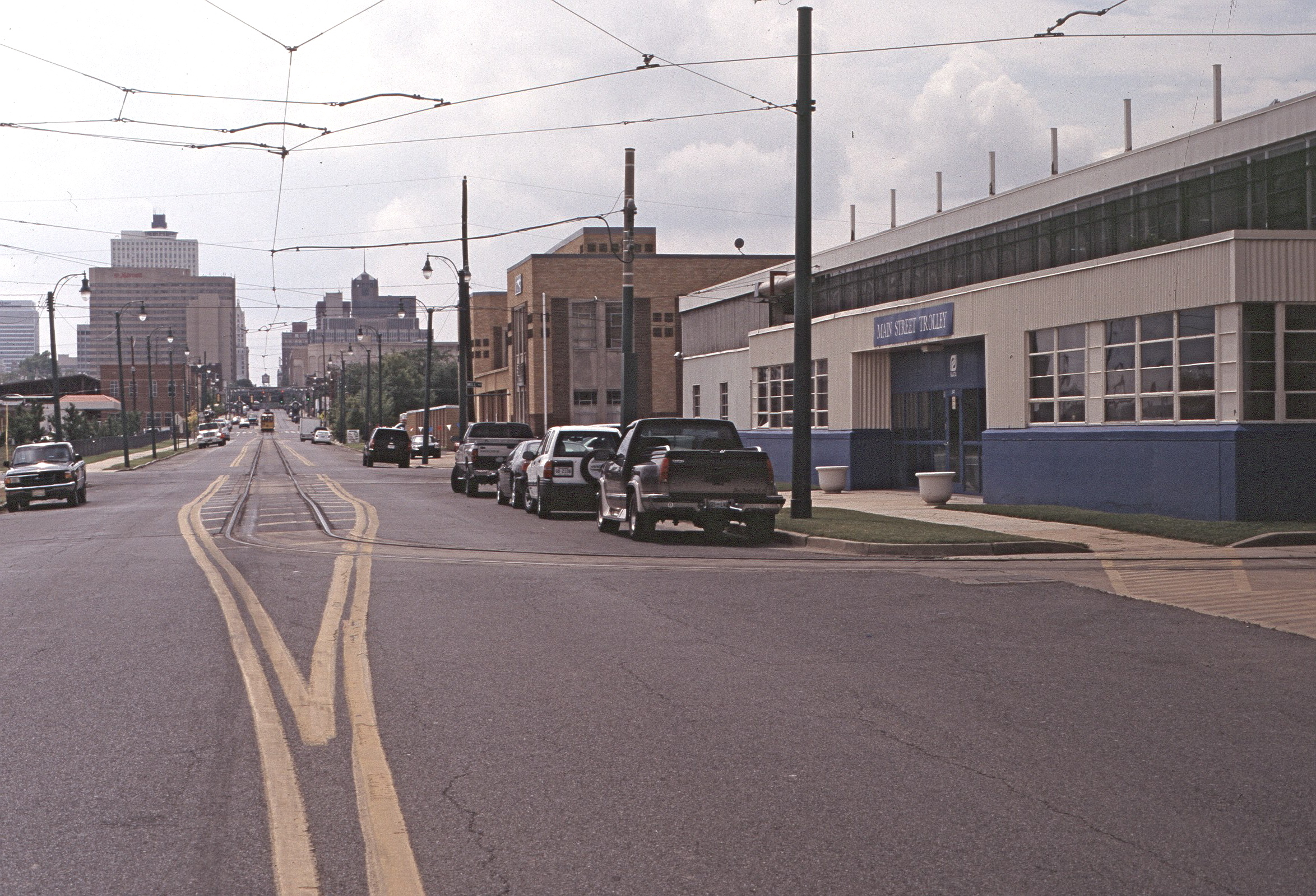 Trolleydepot Memphis